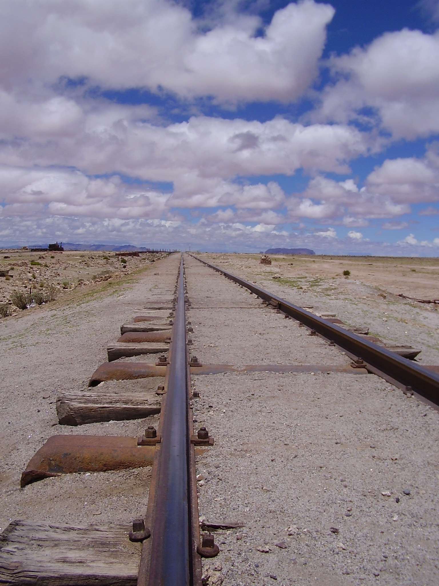 Cemitério de trens, Bolivia